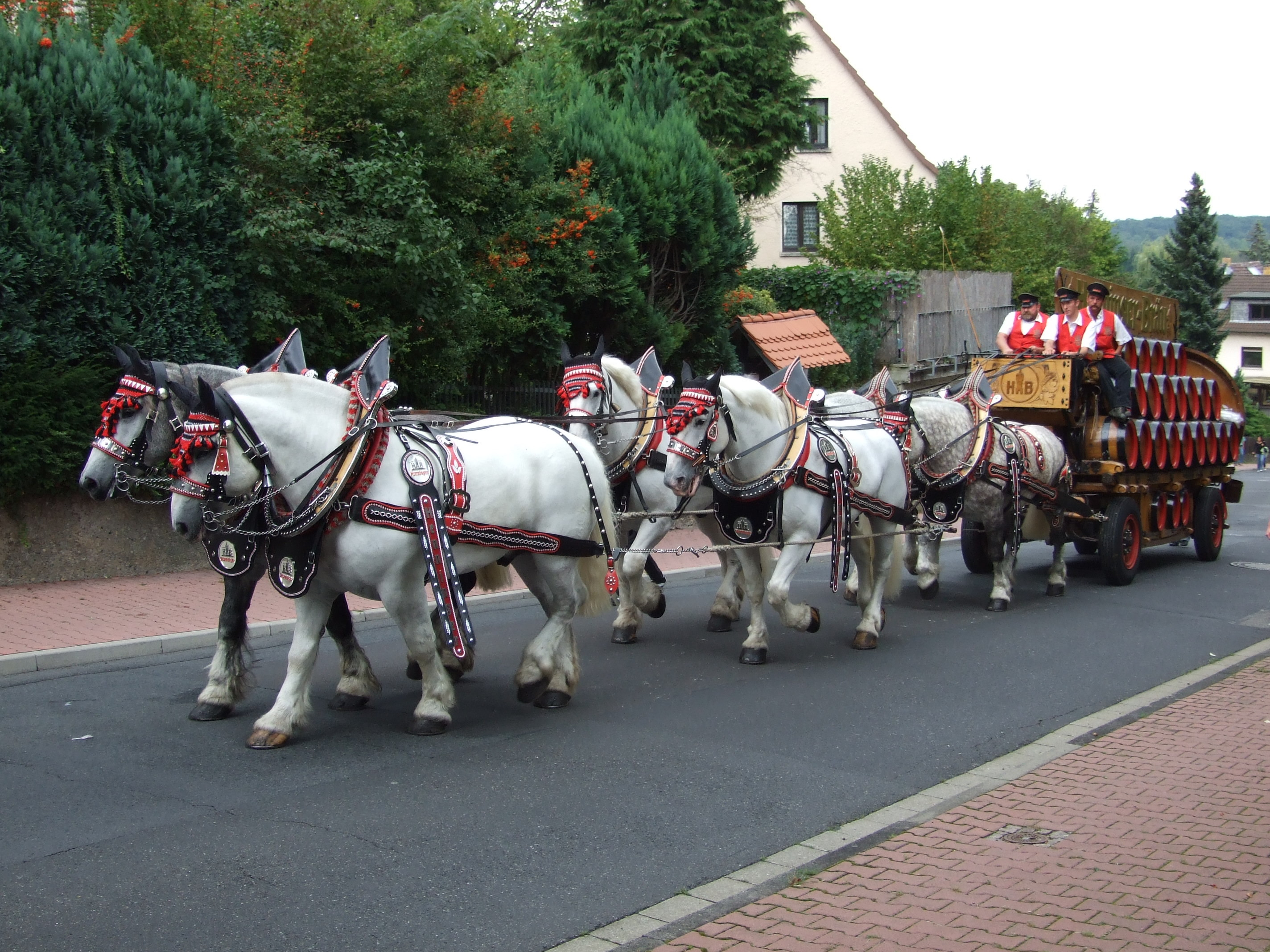 Henninger-Braeu-Wagen, beim Festumzug zur 950-Jahrfeier in Ffm-Bergen-Enkheim